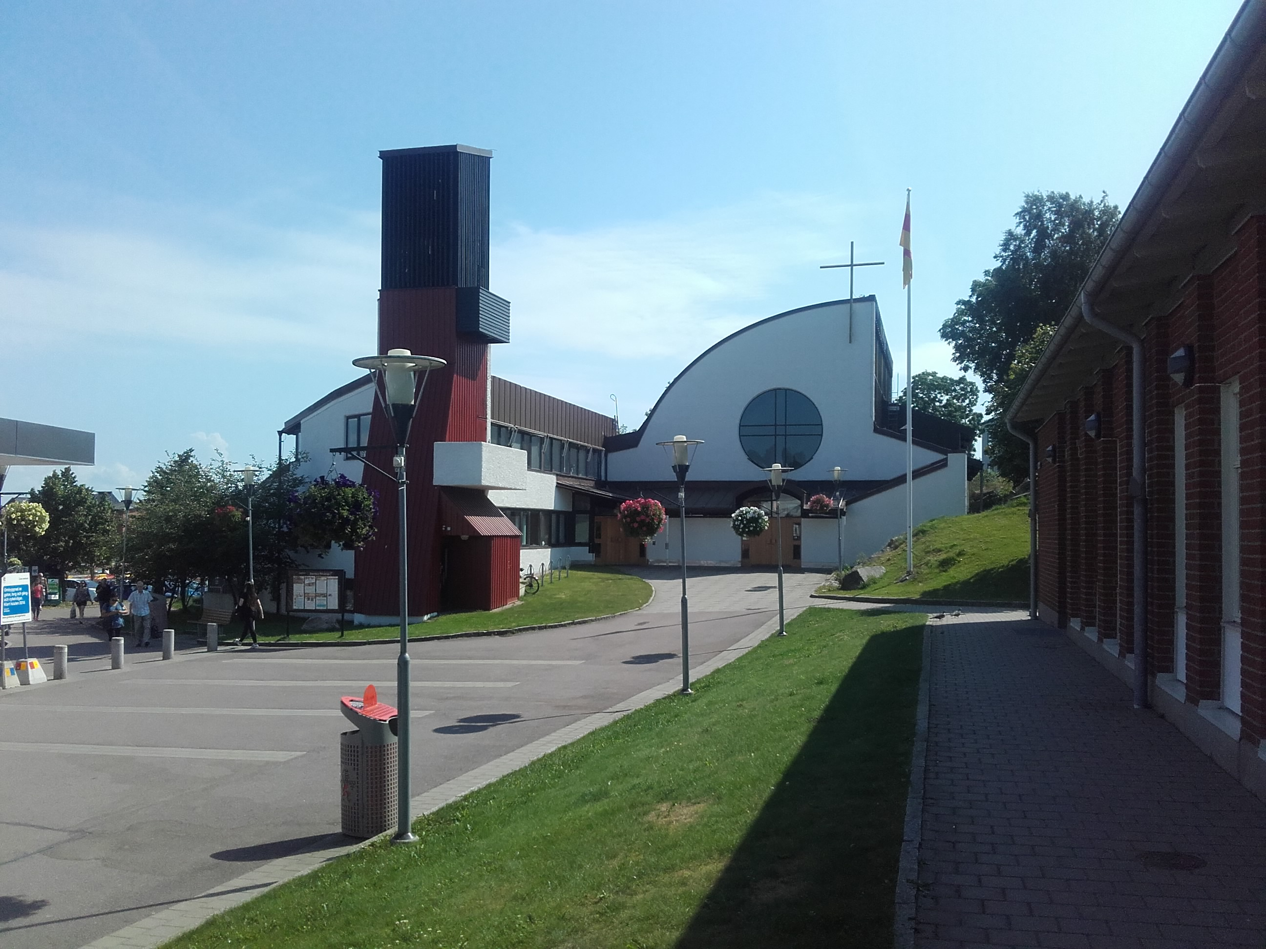 Glöstorpskyrka i Tuve, Göteborg